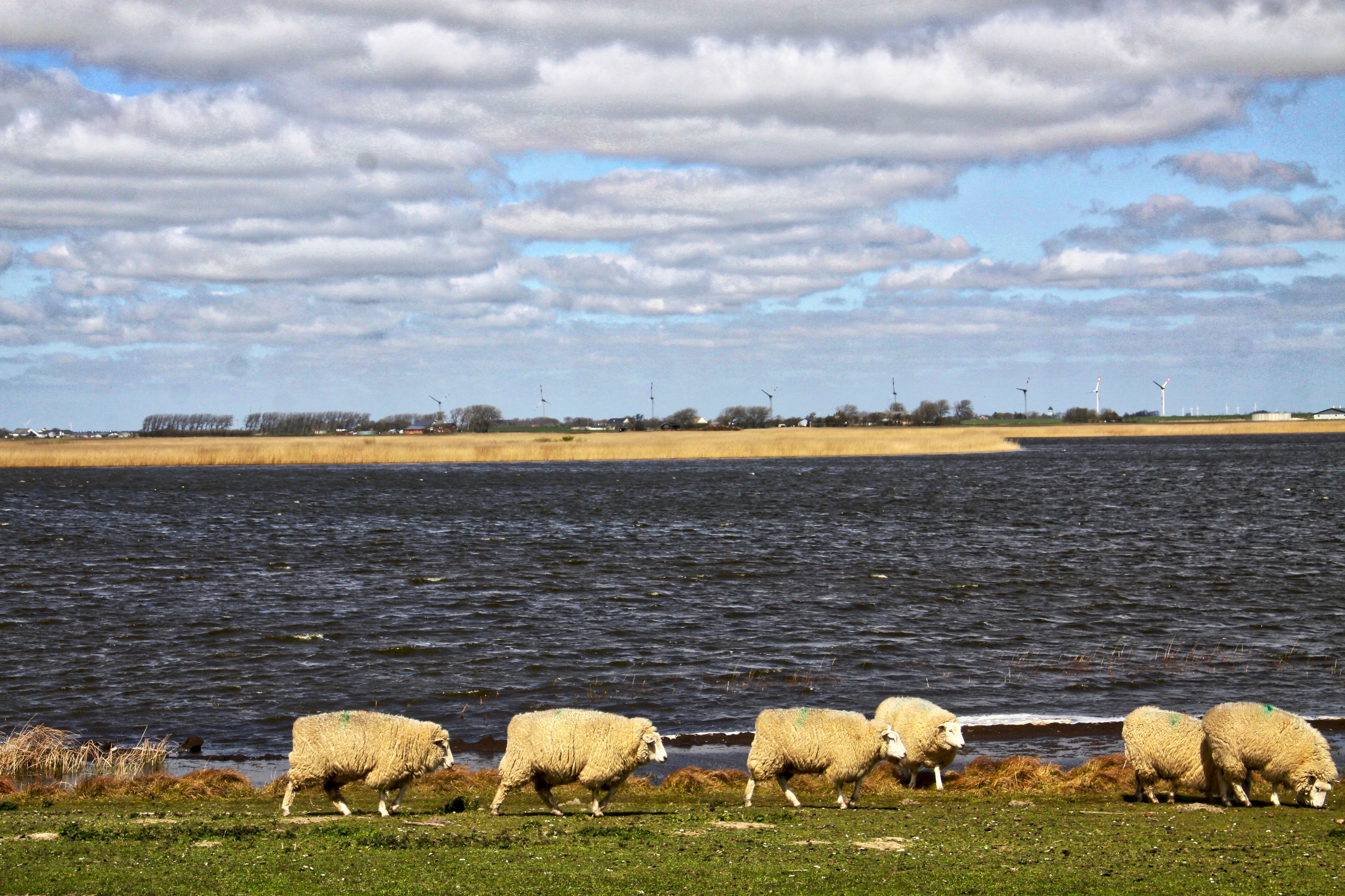 Deichbewirtschaftung. Nicht in Objektliste eingetragenes NSG. Siehe Hauke-Haien-Koog